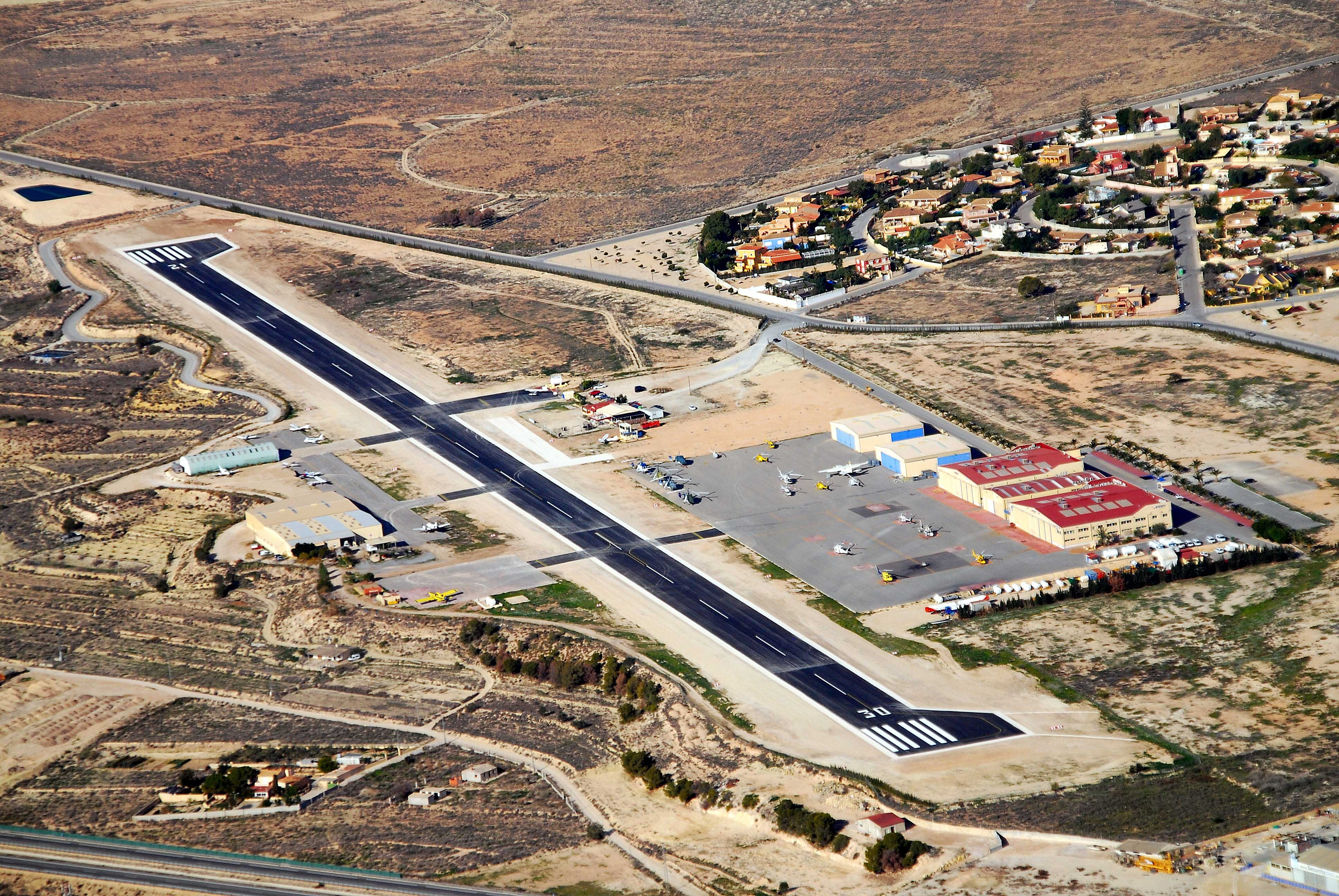 Foto aérea del Aeródromo de Mutxamel